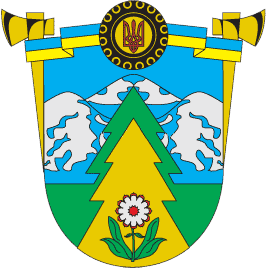 Герб Верховинського району